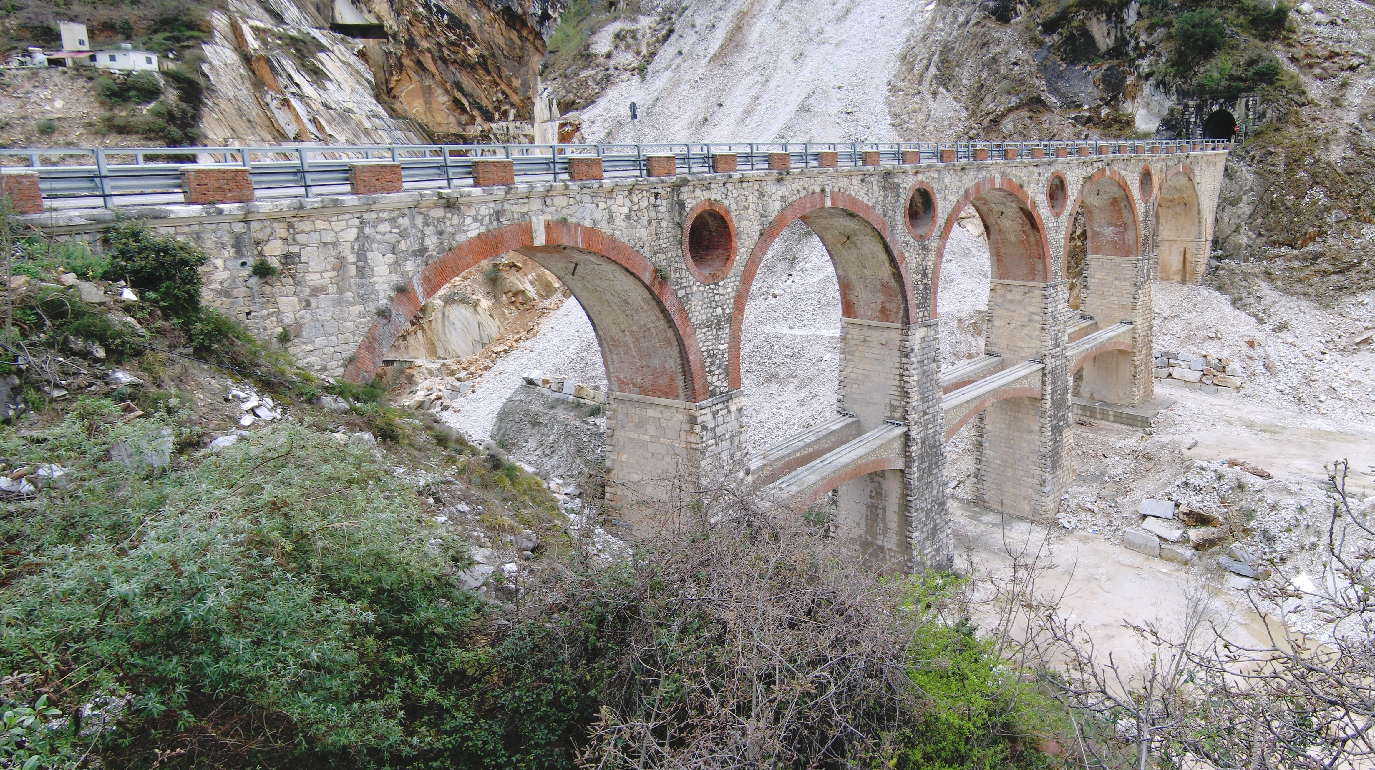 Ponti di Vara della Ferrovia Marmifera di Carrara.